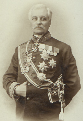 Тодор Минков.